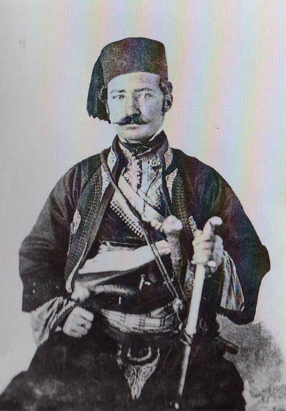 Миливоје Петровић Блазнавац (1824-1873), генерал и политичар, председник Владе Србије. Извор: Аутор: Анастас Јовановић фотографија око 1850.